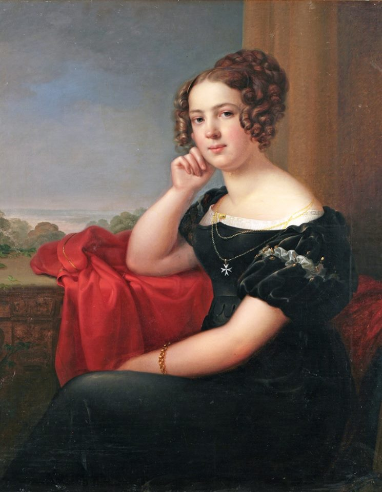 Gemahlin des Gustav Adolf von Hessen-Homburg, Tochter des Erbprinzen Friedrich von Anhalt-Dessau